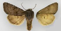 Lasionycta impingens curta male